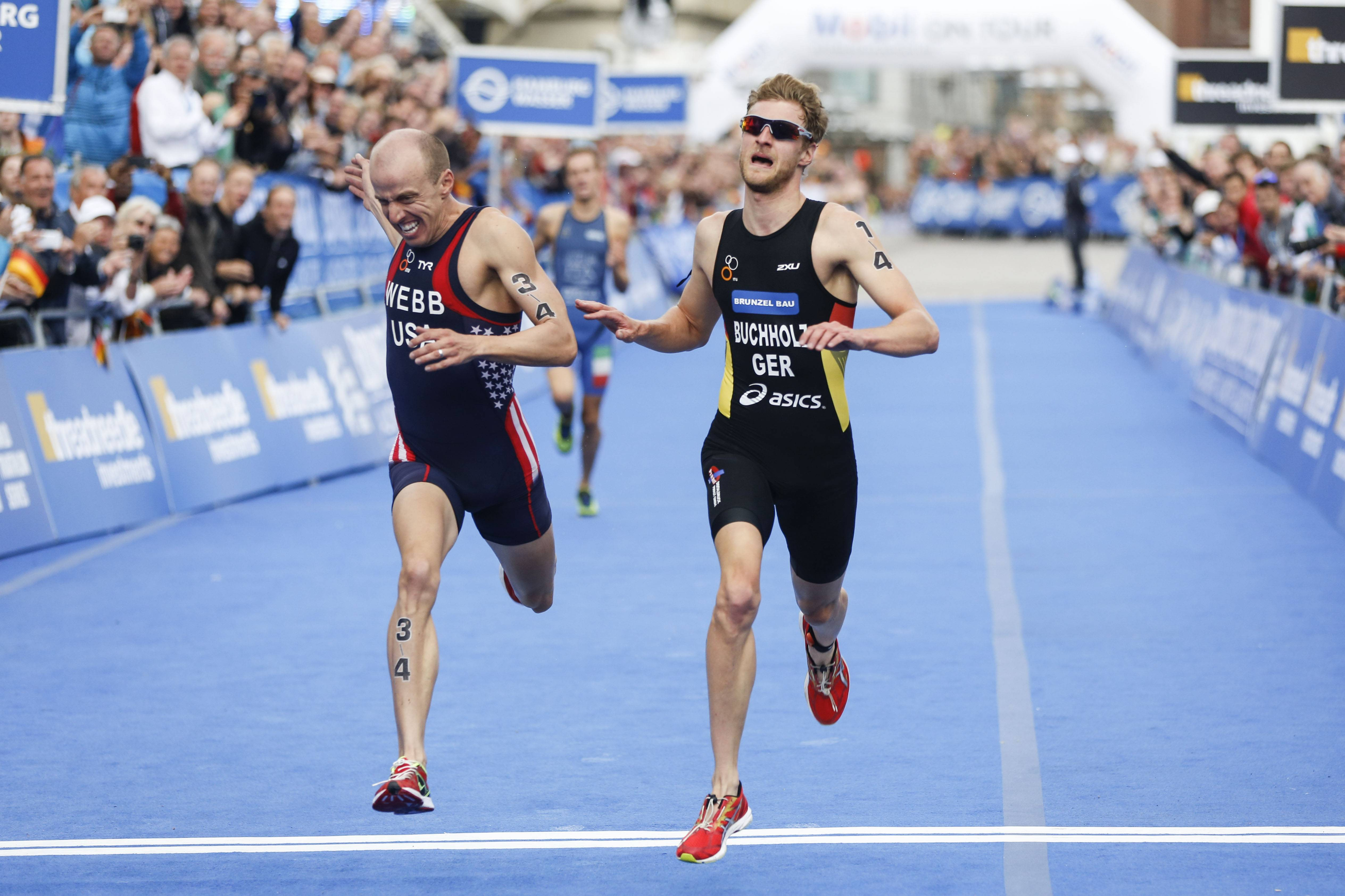 Gregor Buchholz finishs at 2014 ITU World Triathlon Hamburg